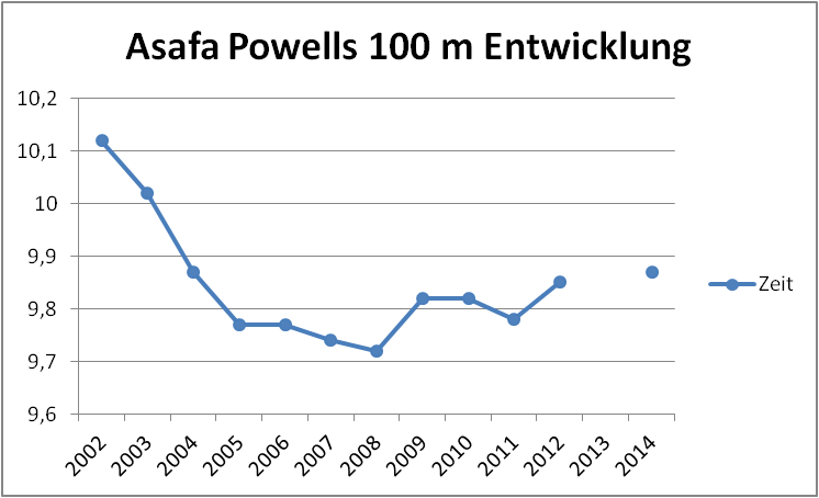 Entwicklung der Saisonbestleistung 100m von Asafa Powell erstellt mit Excel, umgewandelt in png